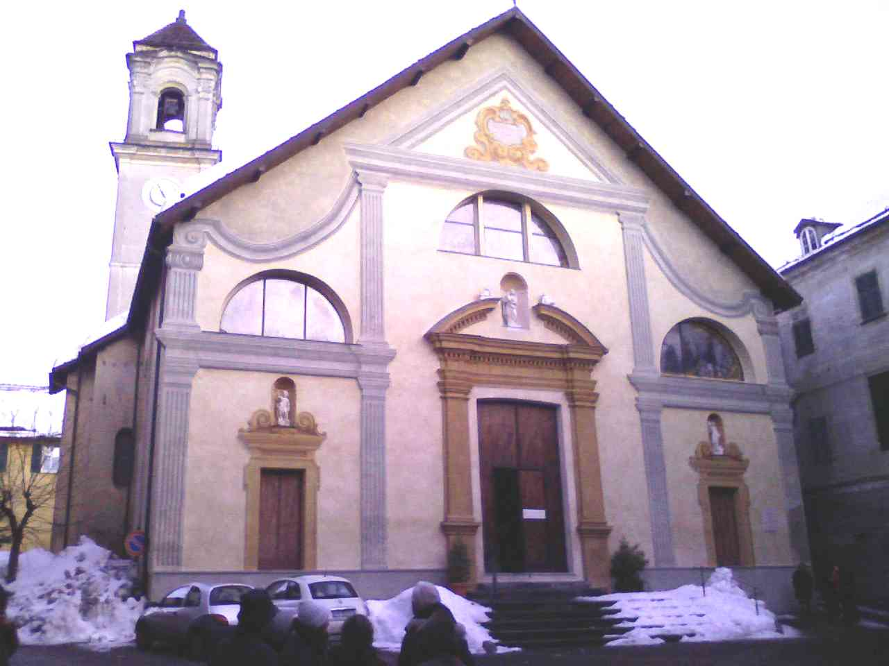 Chiesa Basilica della Visitazione o Concezione in Sassello (Italy)